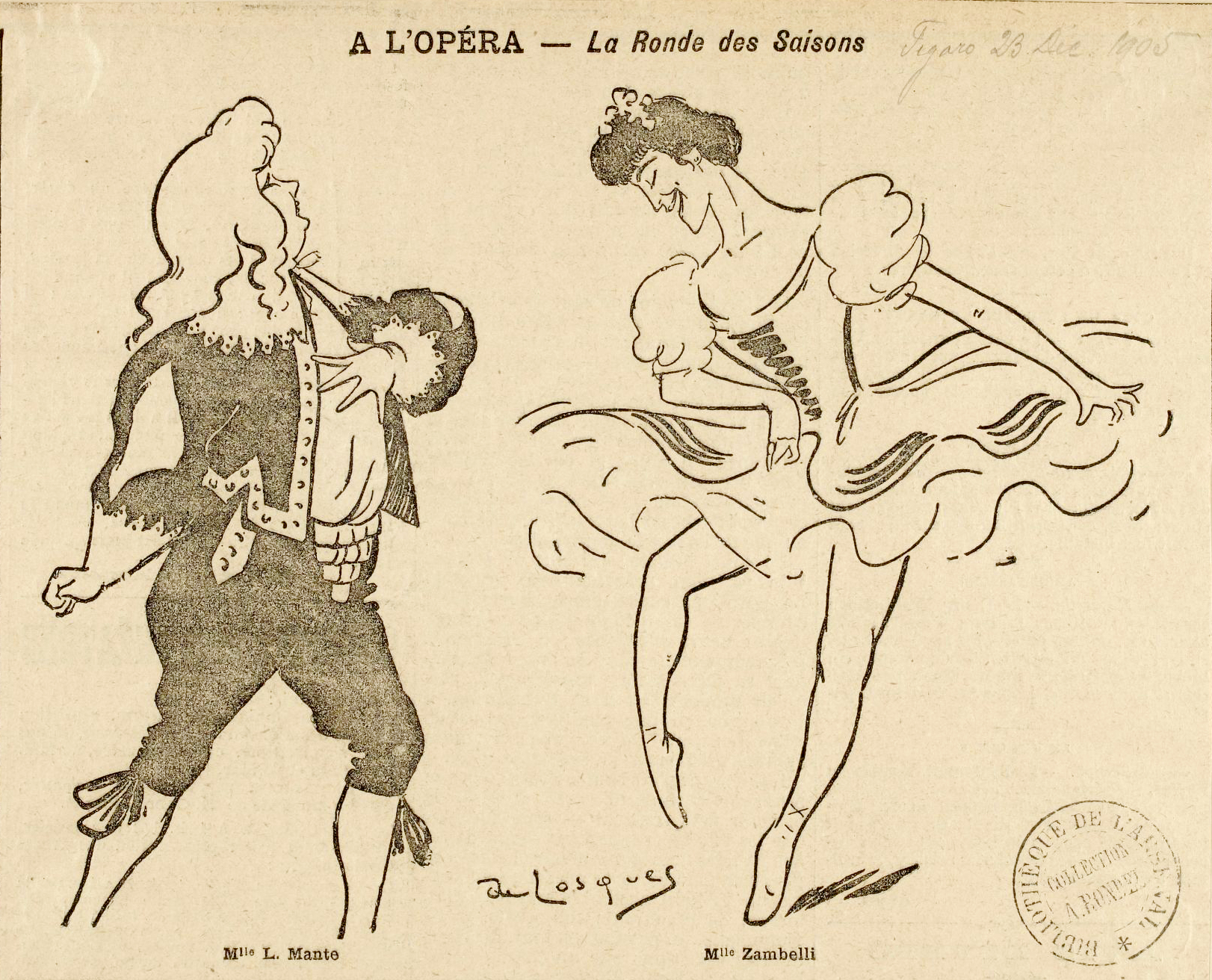 La ronde des saisons, ballet de Joseph Hansen : caricature de presse de Daniel de Losques.